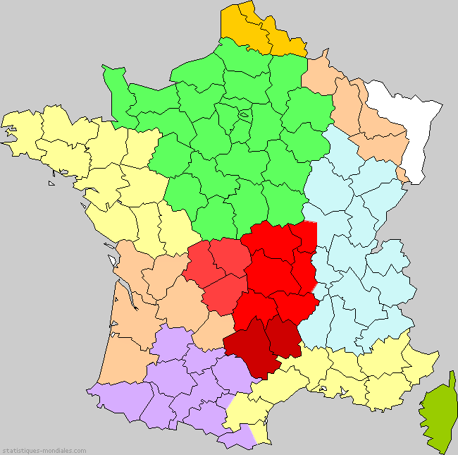 France - Proposition de découpage régional Vidal de la Blache 1903. Source : J.M. Miossec, Géohistoire de la régionalisation en France : L’horizon régional, Quadrige/PUF, 2008